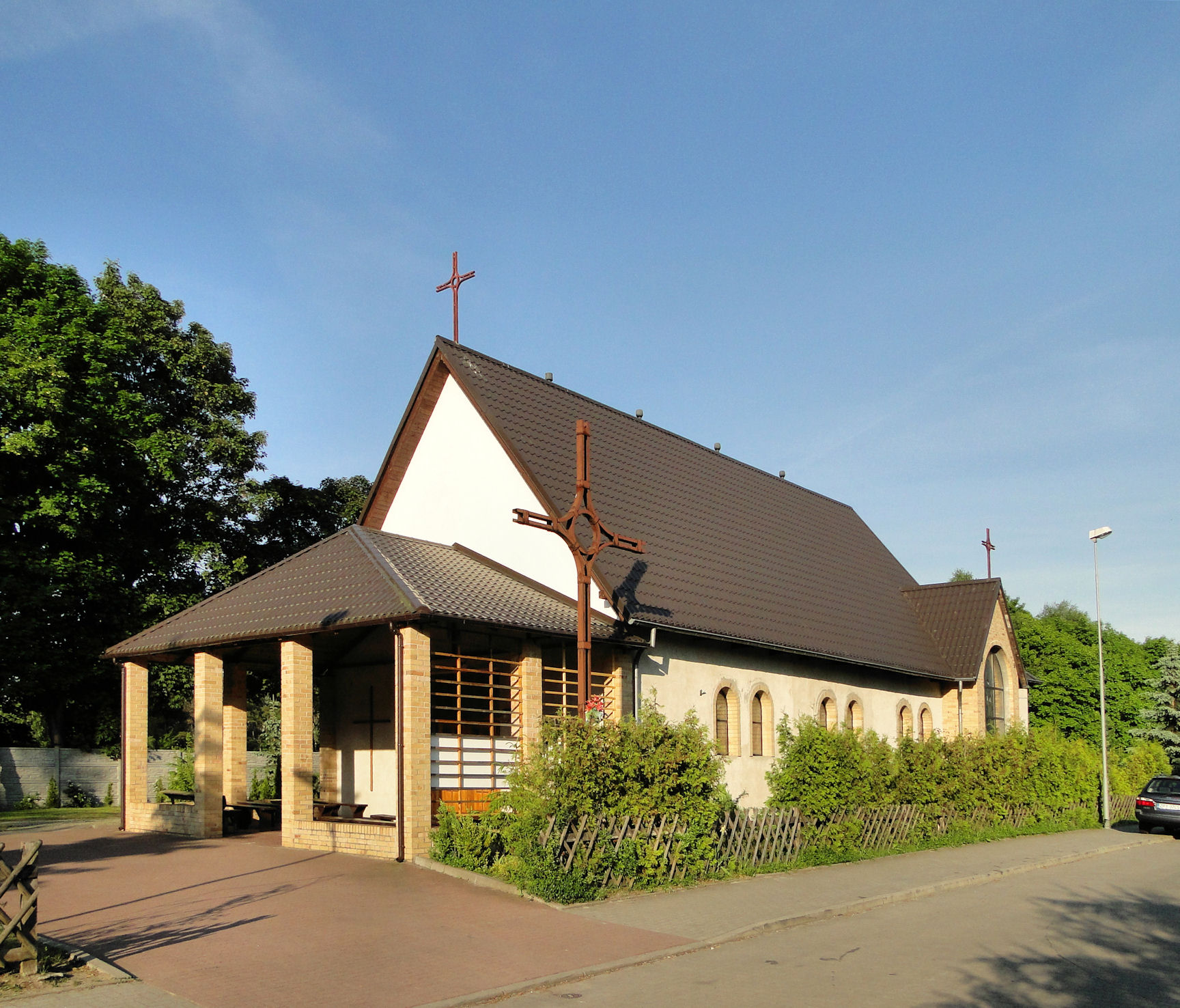 Szczecin Płonia, ul. Abrahama - rzymskokatolicki kościół parafialny p.w. św. Franciszka z Asyżu